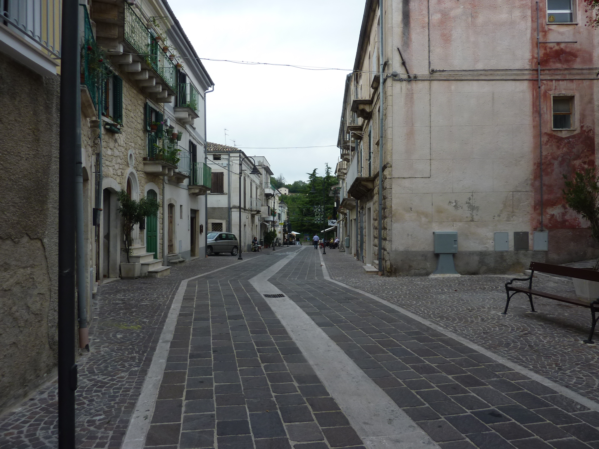 Roccamorice: Via de Horatiis